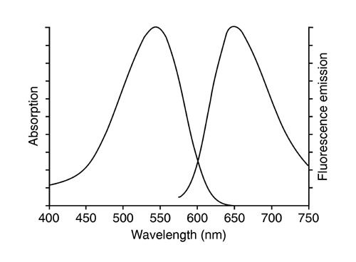 Spektrum von 7-AAD